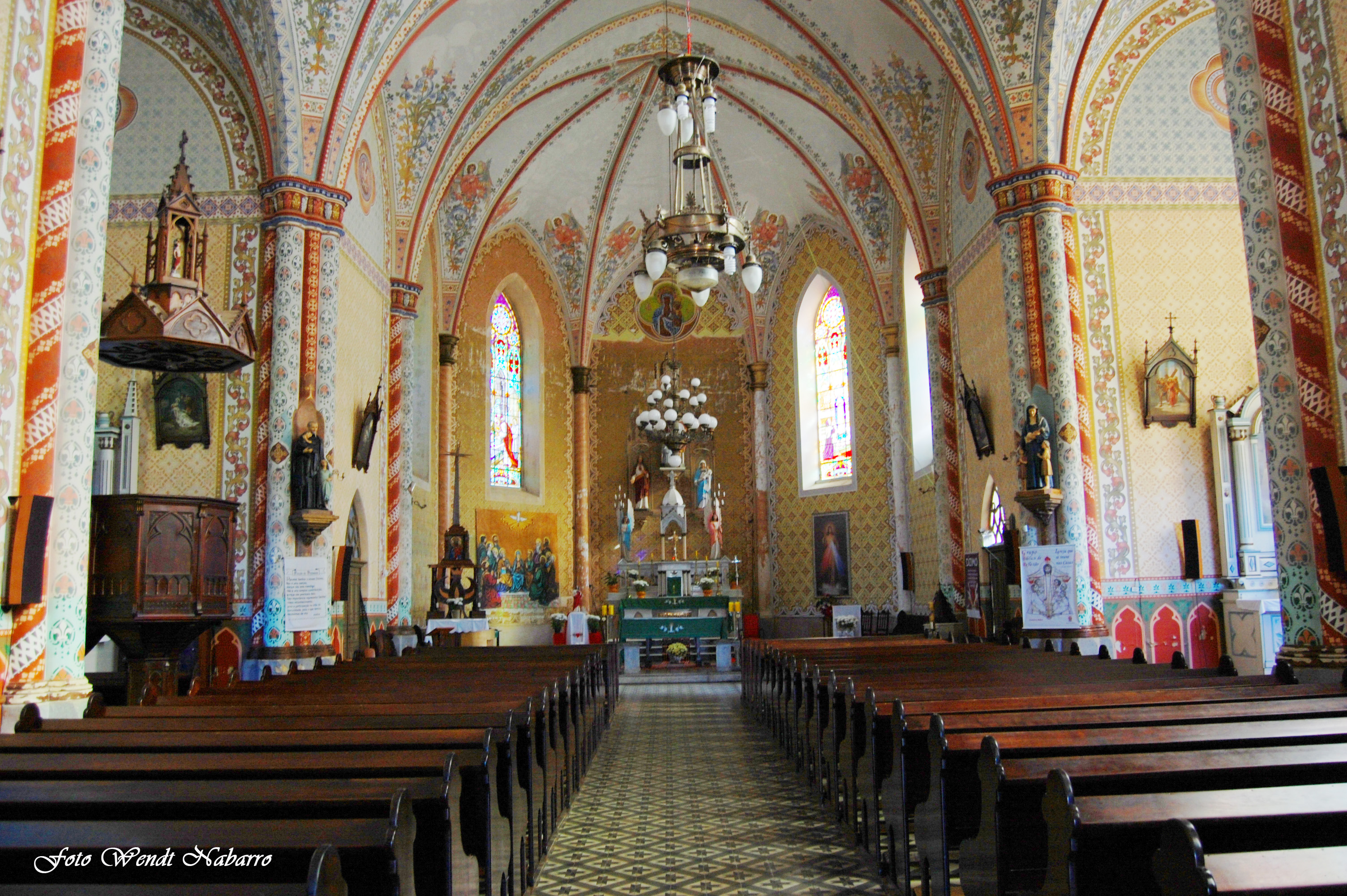 Interior da Igreja de Santo Estanislau, em Paraguaçu, Itaiópolis, Santa Catarina, Brasil